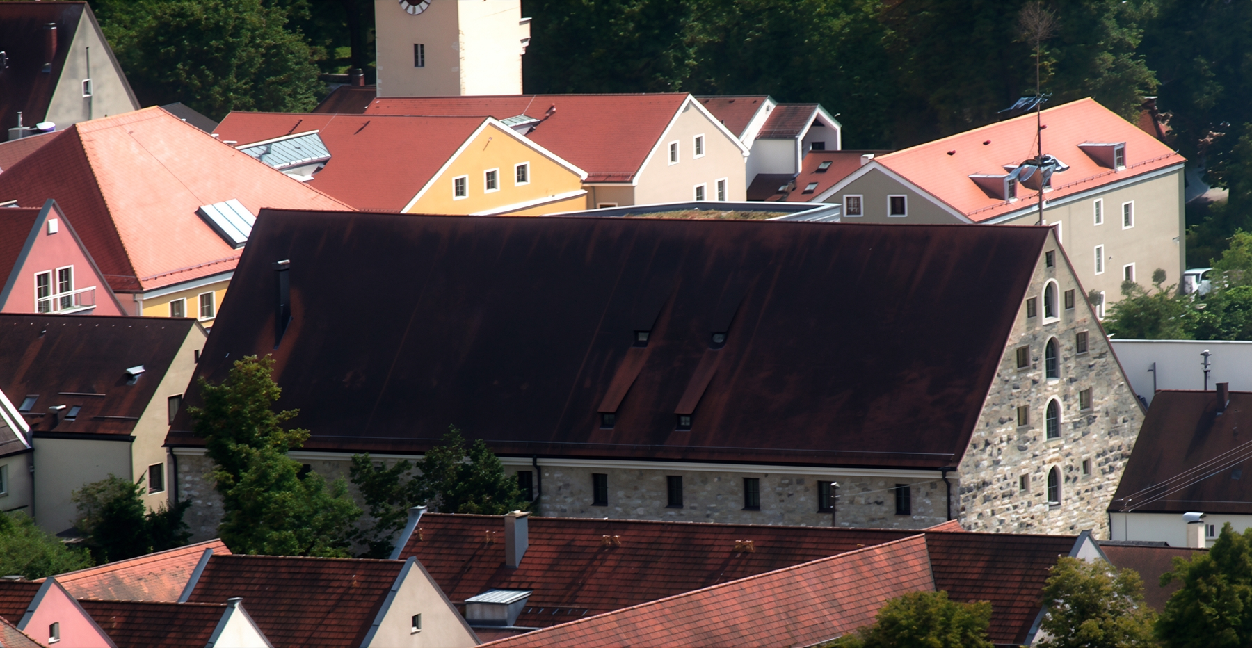 Stadt Kelheim, Niederbayern: Herzogkasten, städtischer Getreidespeicher aus dem 15. Jahrhundert; nun archäologisches Museum